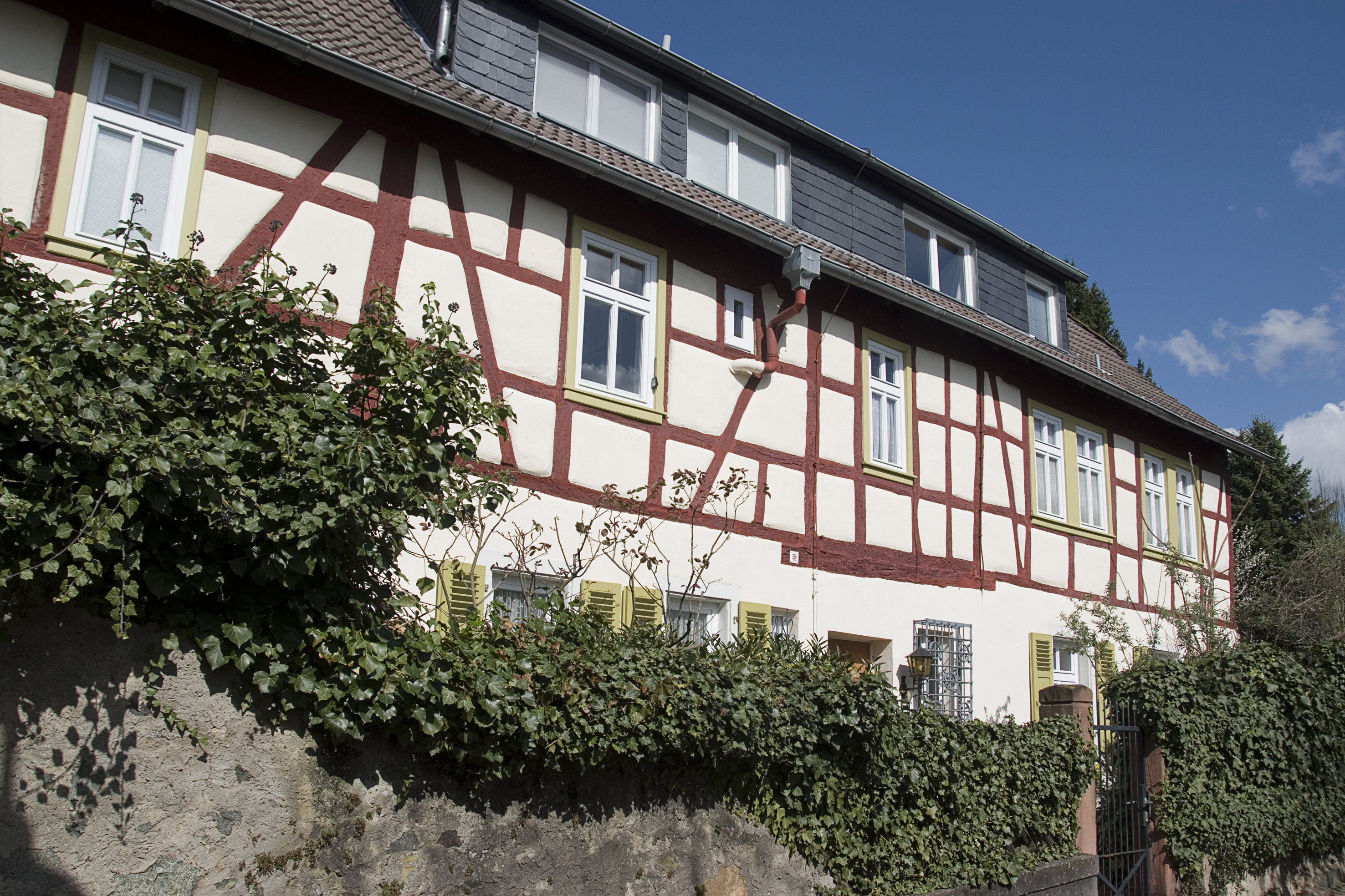 Denkmalgeschütztes Gebäude (ehemaliges Amtshaus) in Seeheim-Jugenheim, Ortsteil Seeheim, Villastraße 2